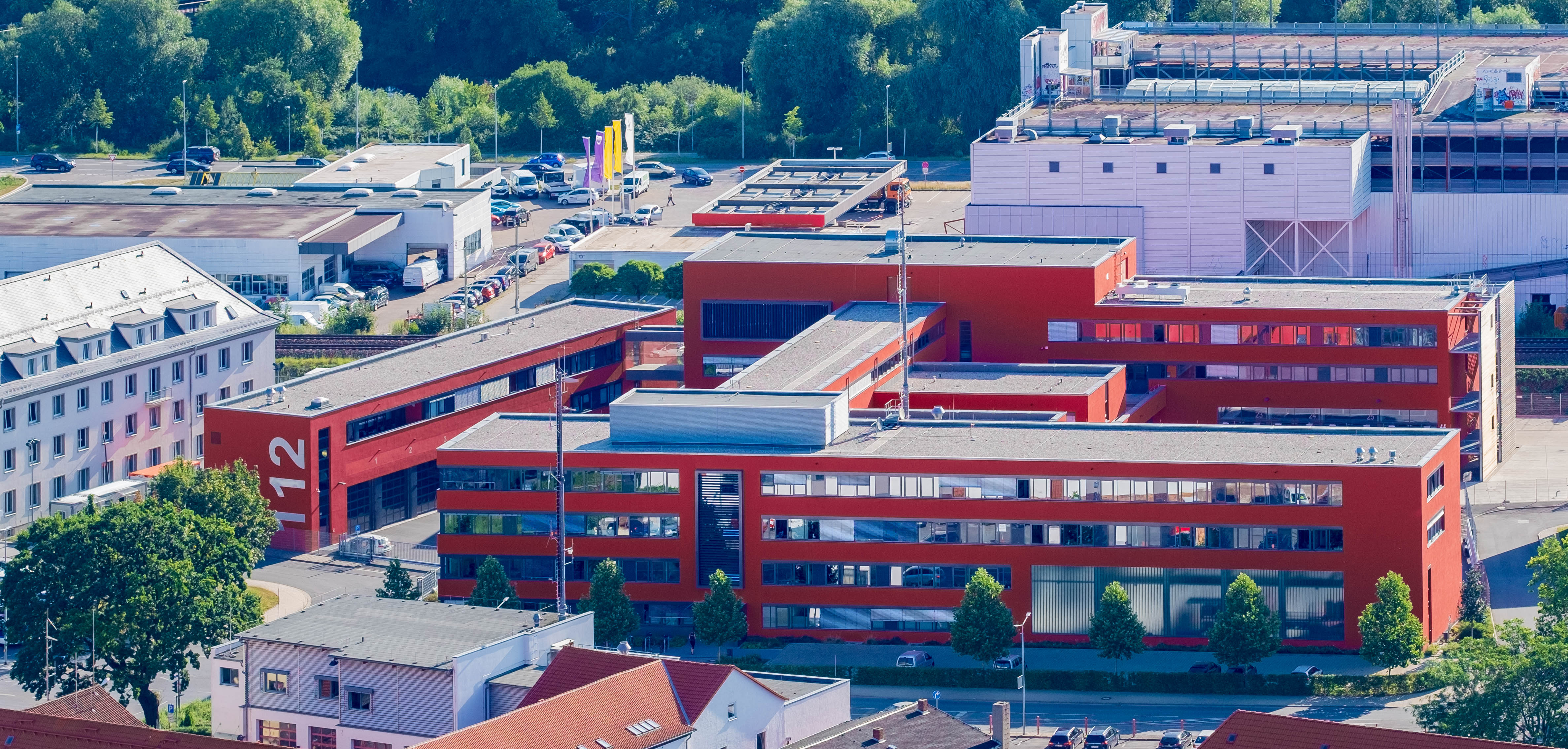 Feuerwehr Jena gesehen vom Jentower